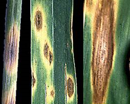 Stagonospora nodorum attaque sur feuille